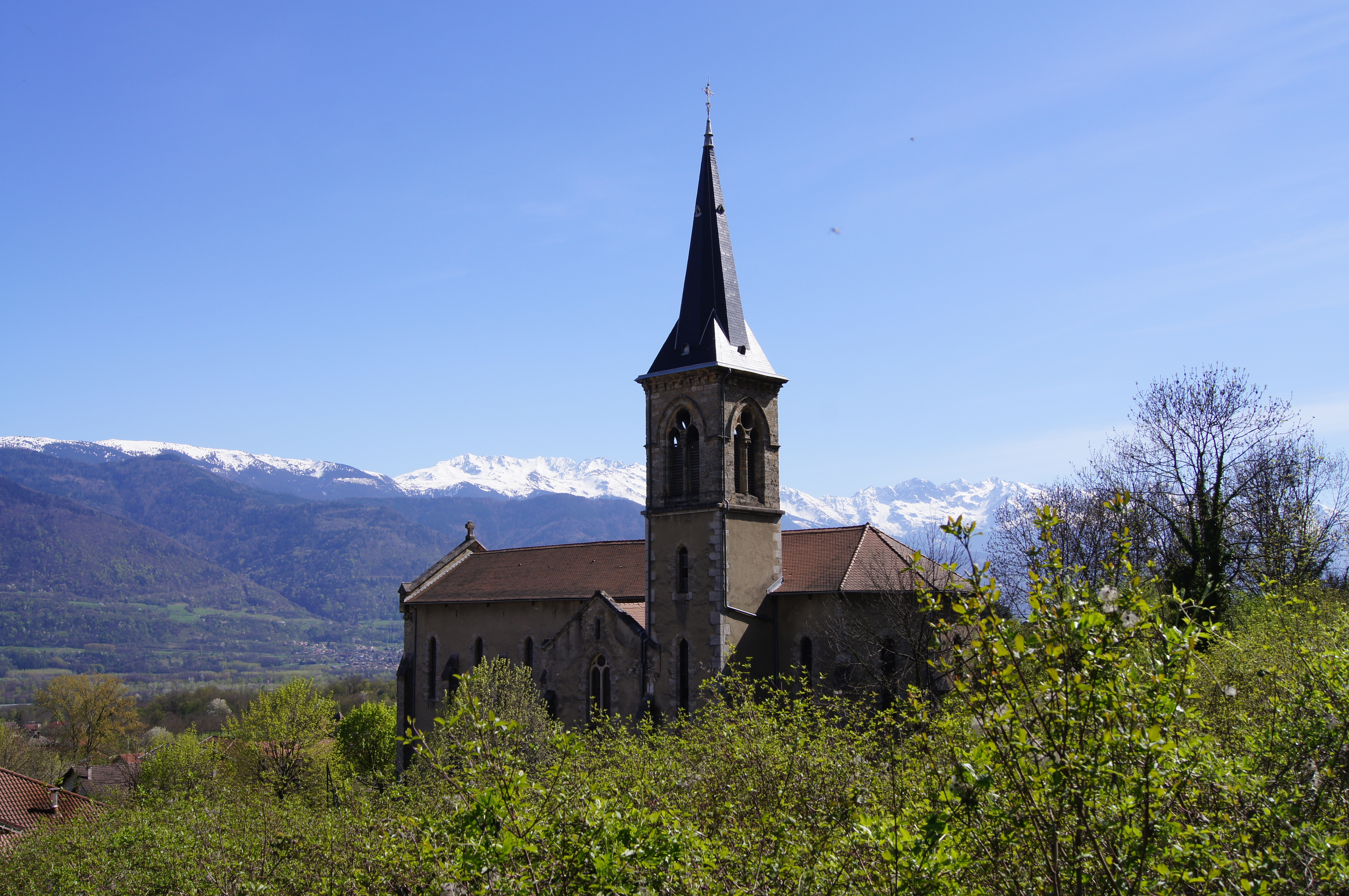 Qafár af: Eglise ST VINCENT DE MERCUZE